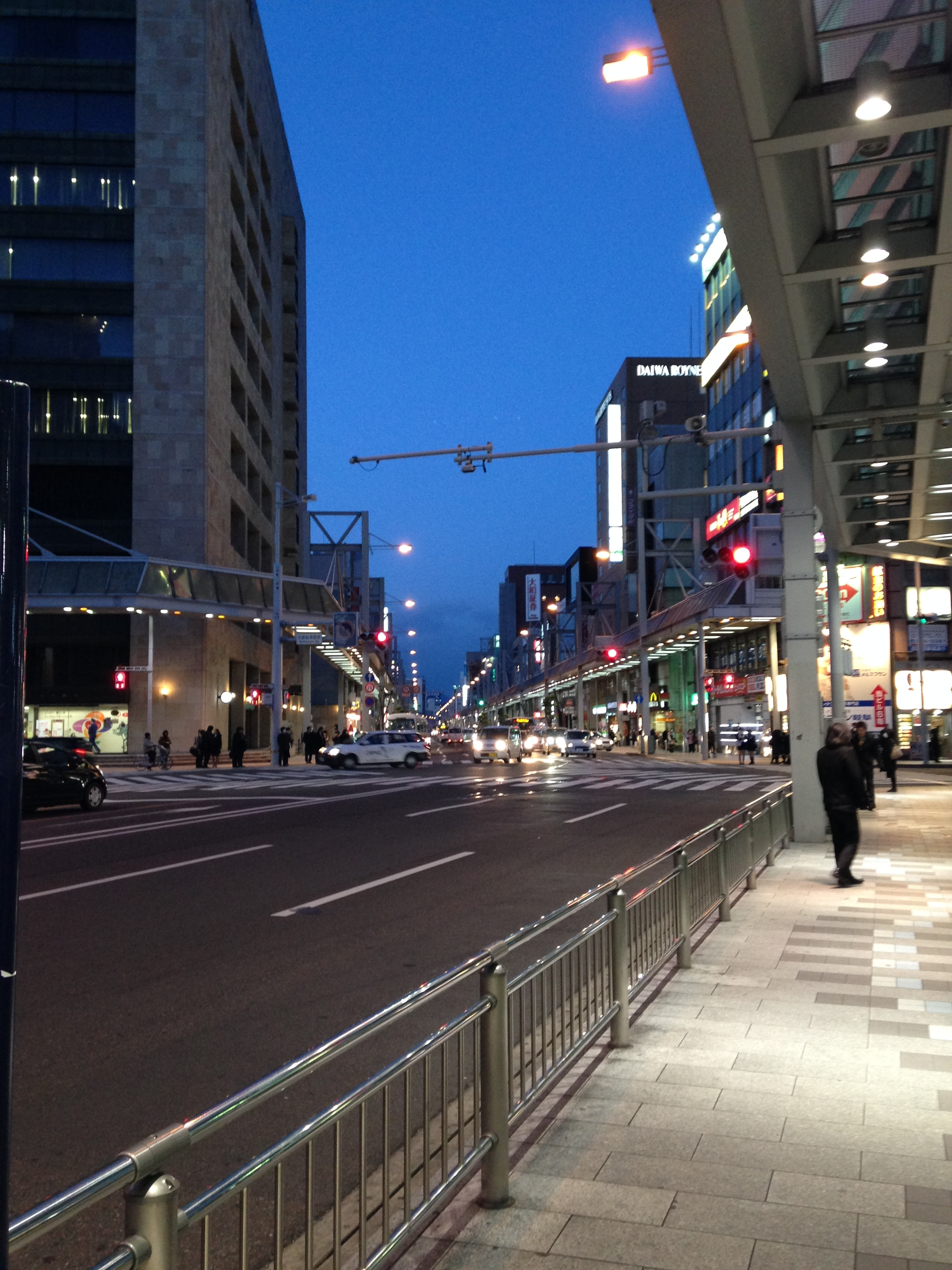 夜の名鉄岐阜駅前風景